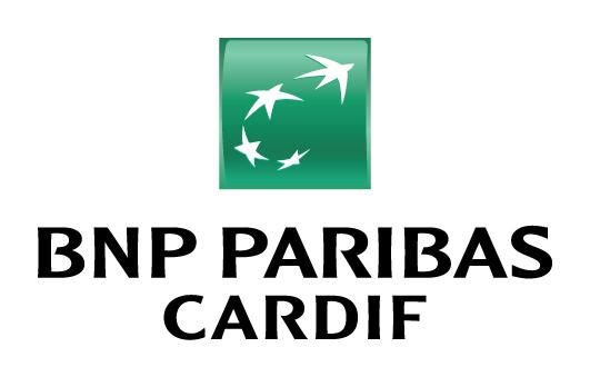 カーディフ生命保険会社